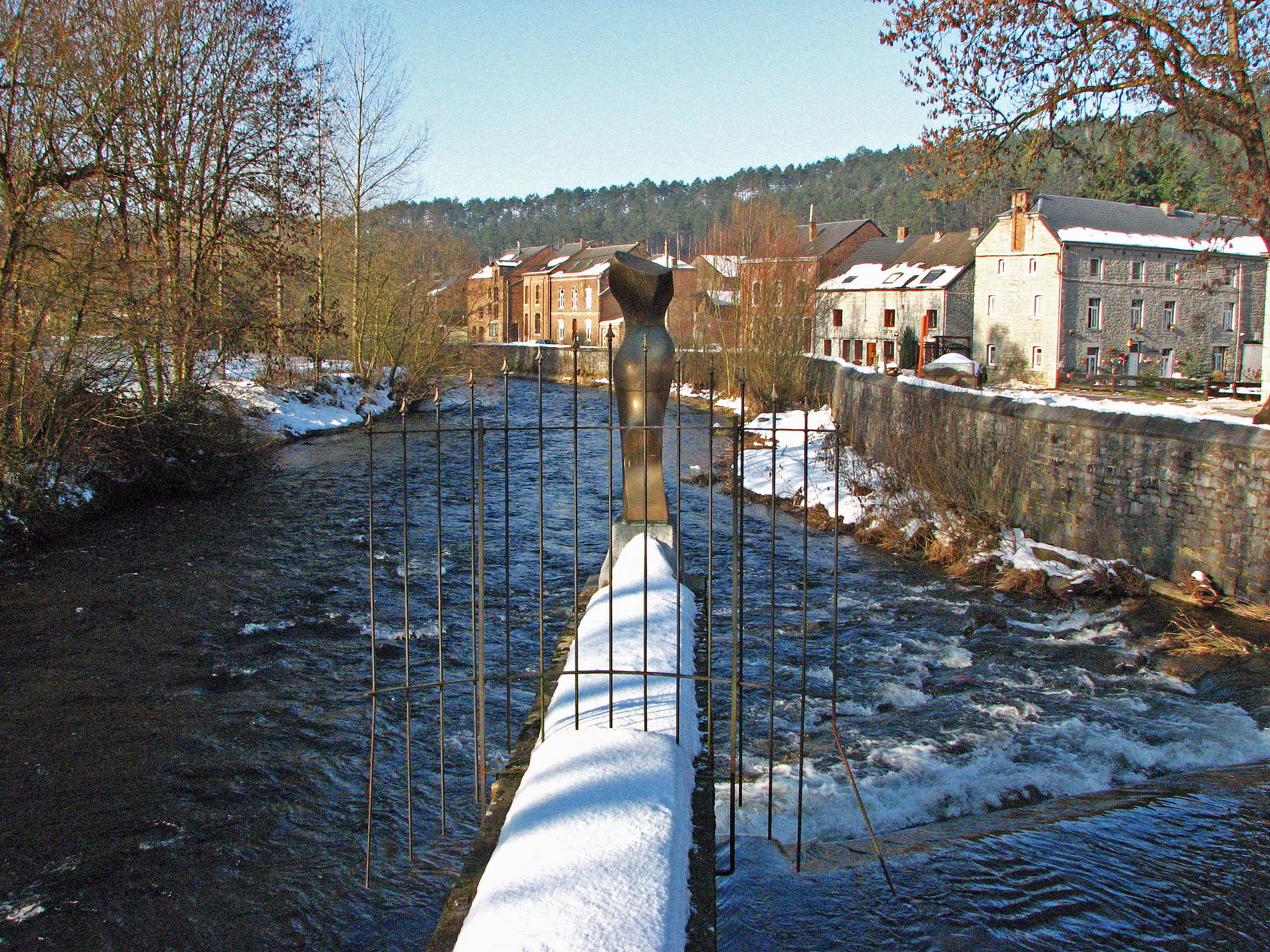 De samenvloeiing van de Wamme en de Lomme te Jemelle